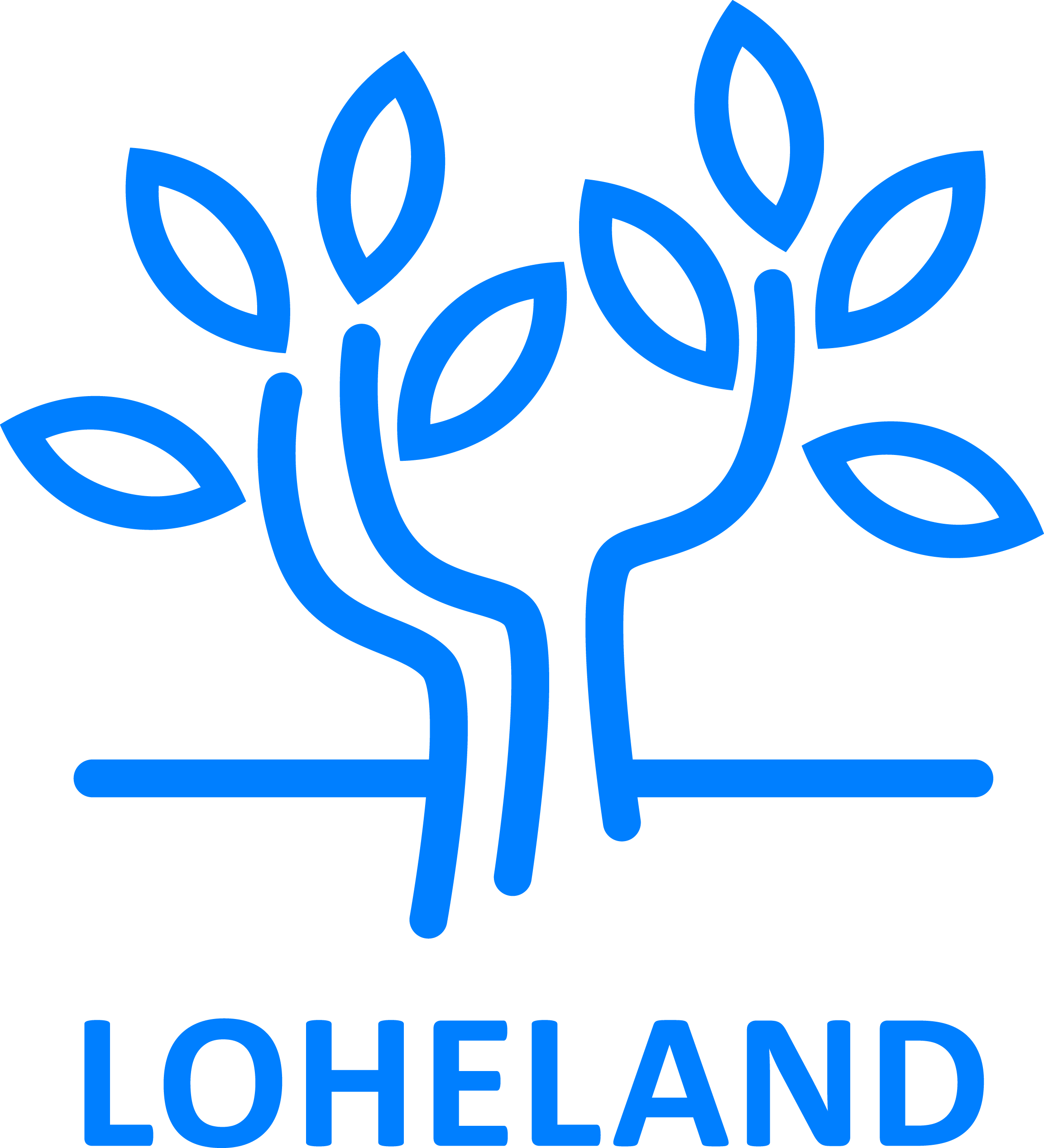 Logo der Loheland-Stifung